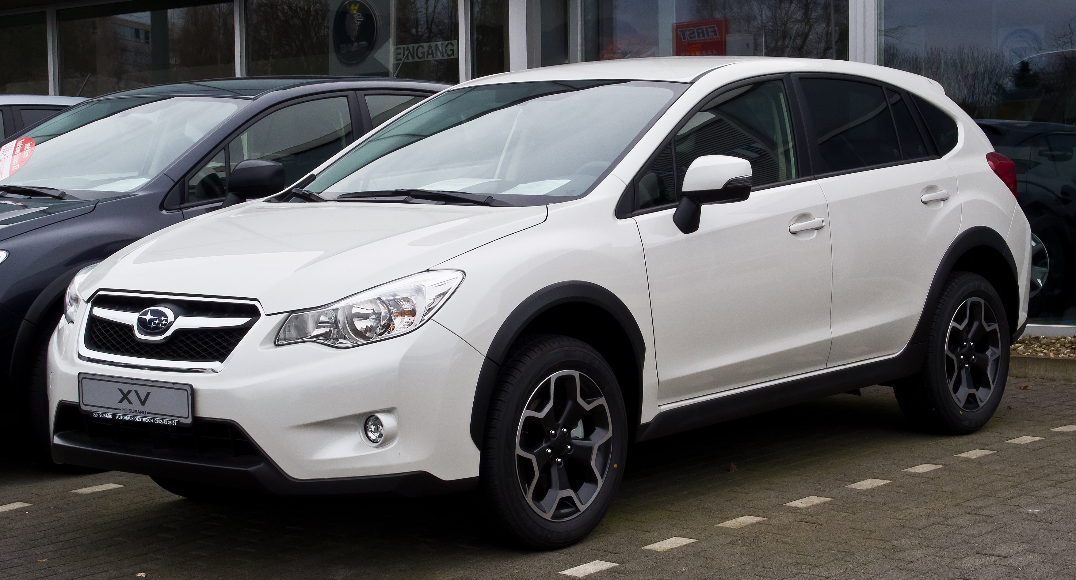 Subaru XV 1.6i Comfort